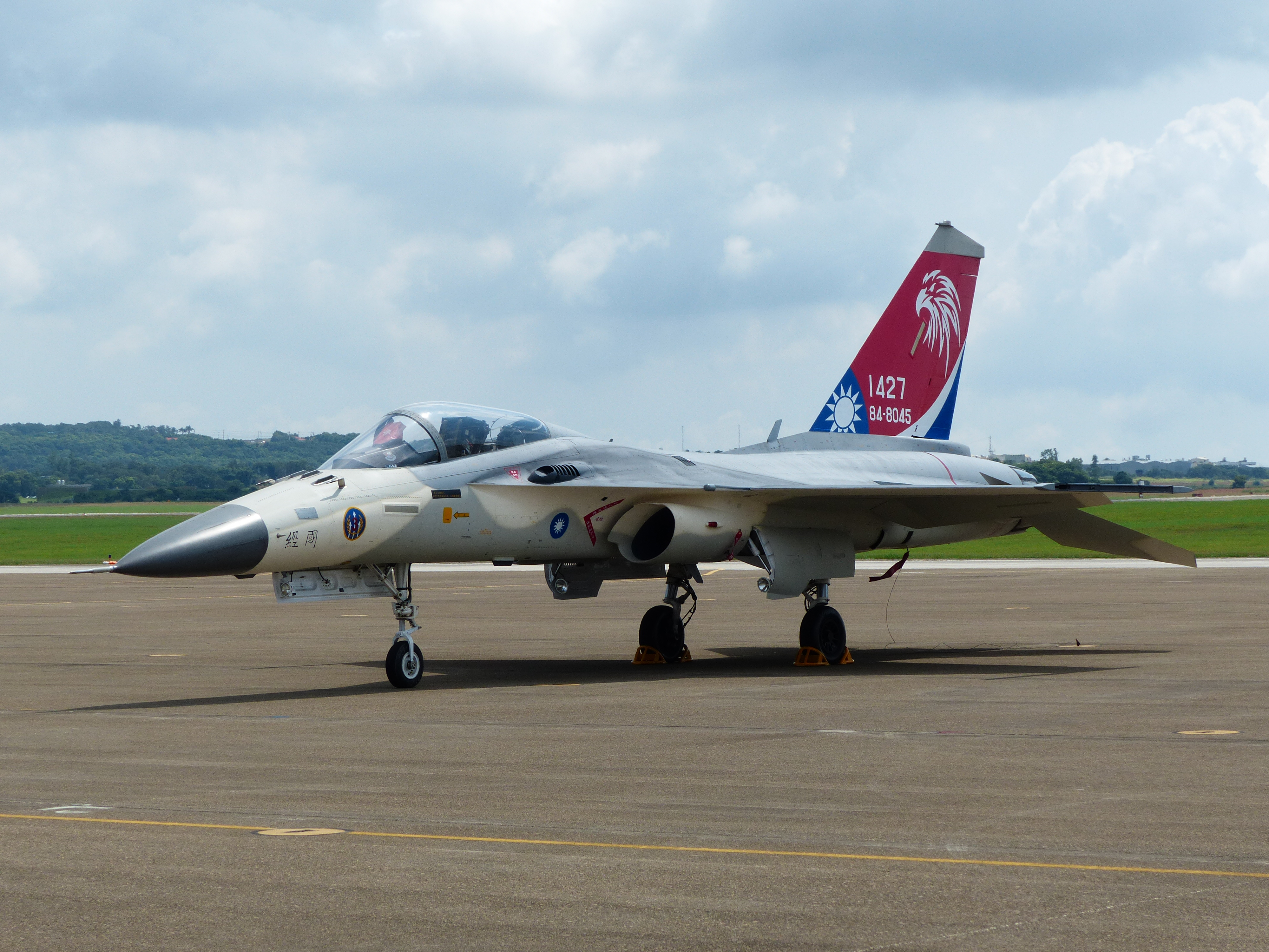 停機坪上的空軍四二七聯隊經國號F-CK-1A 1427彩繪展示機左前方；彩繪機垂直尾翼以中華民國國旗紅、白、藍三色為基調，飾以鳳頭蒼鷹頭像，象徵守護領域的威武與IDF之高性能。